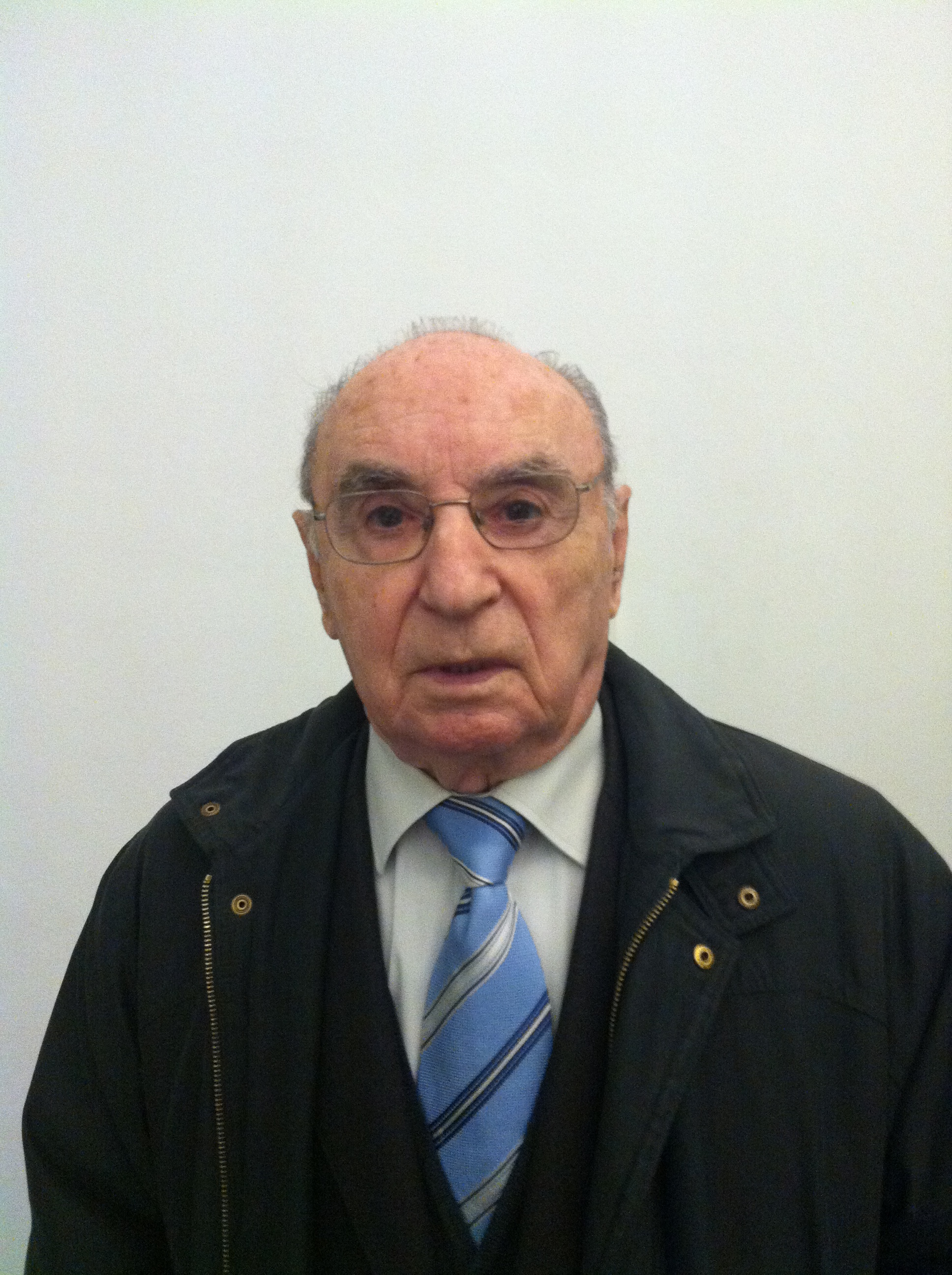 Joan Colom i Altemir al MACBA a la inauguració de l'exposició sobre el CIFB